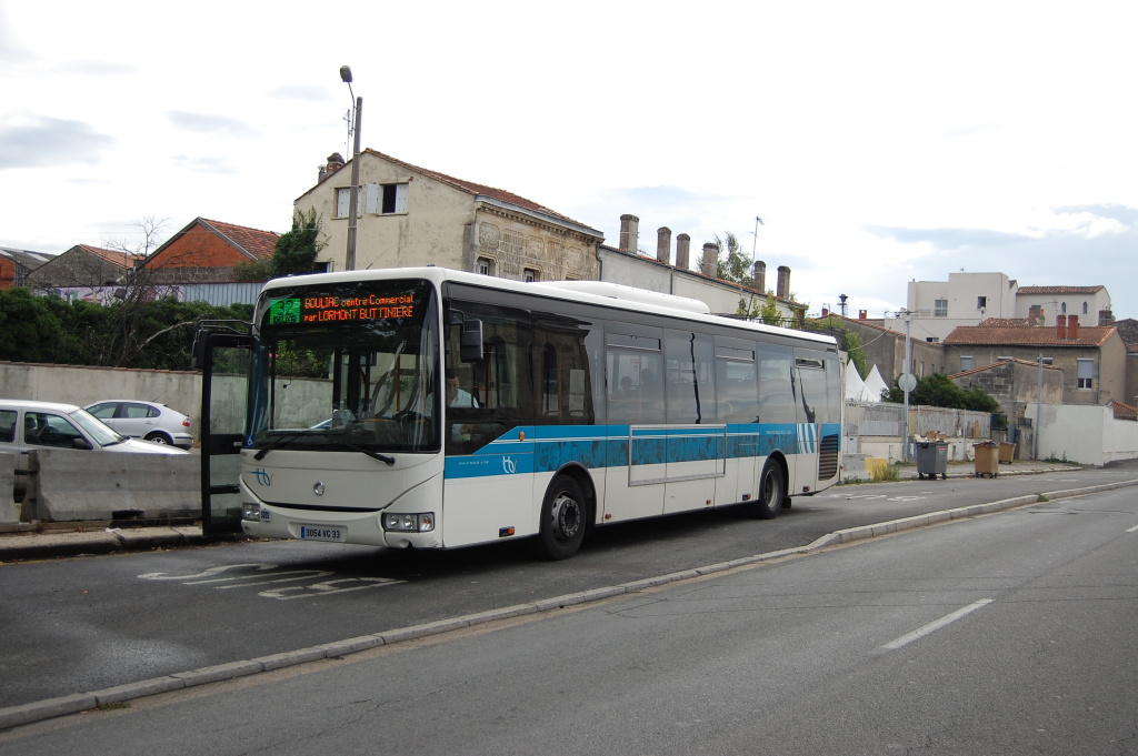 Photo d'un bus du réseau TBC à Bordeaux sur la Ligne 32 Corol.